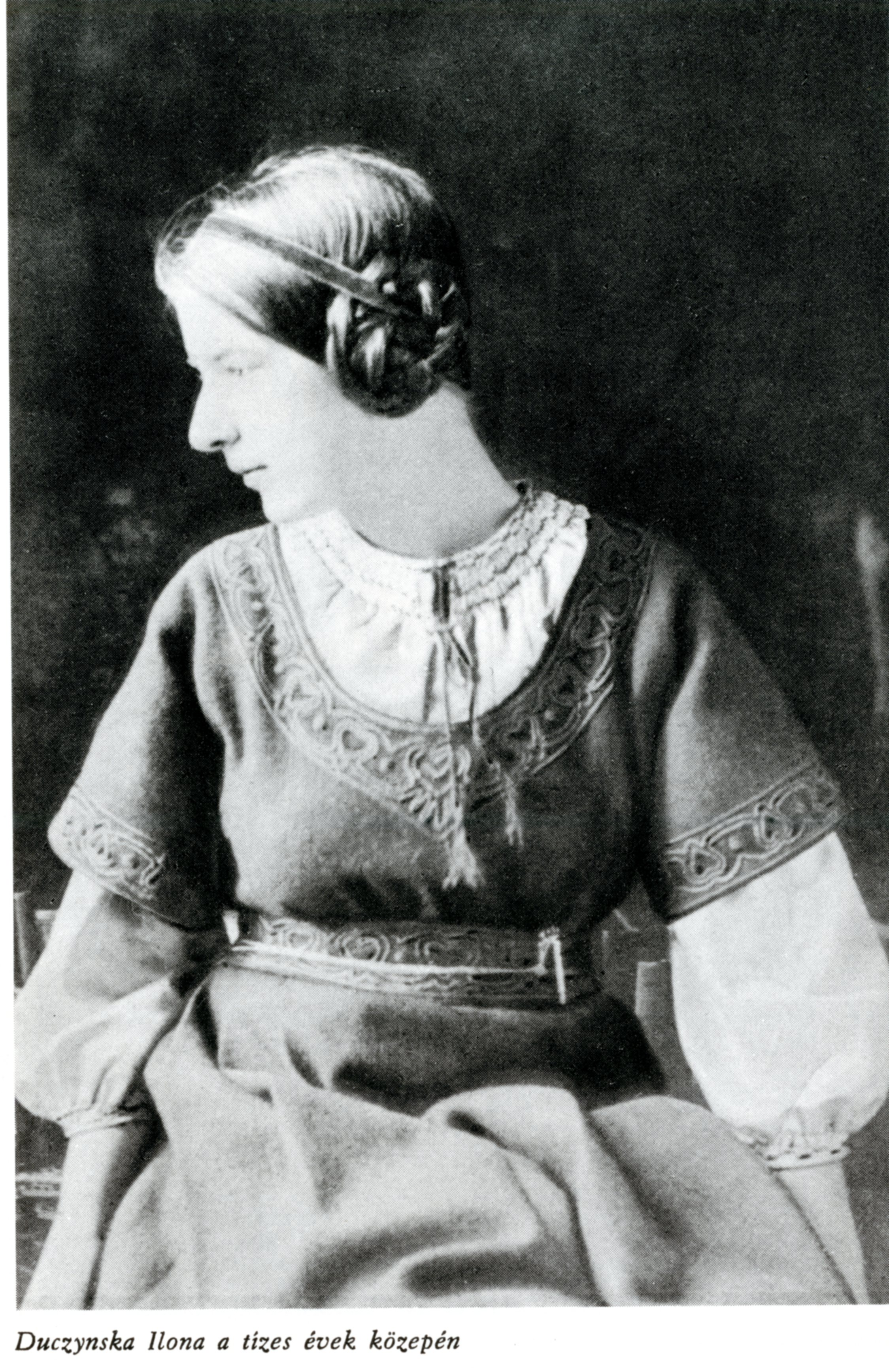 Duczyńska Ilona (olykor Ducsinszka, Dutczinsky, magyarul: Duczynska, teljes nevén: Duczyńska Mária Dorottya Angyalka Ilona) (Maria Enzersdorf, Ausztria, 1897. március 11. – Pickering, Kanada, 1978. április 23.) magyar újságíró